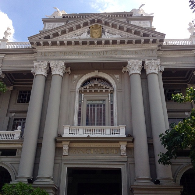 Ilustre Municipalidad de Guayaquil